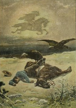 Ilustrace Věnceslava černého k románu Karla Maye Duch prérie